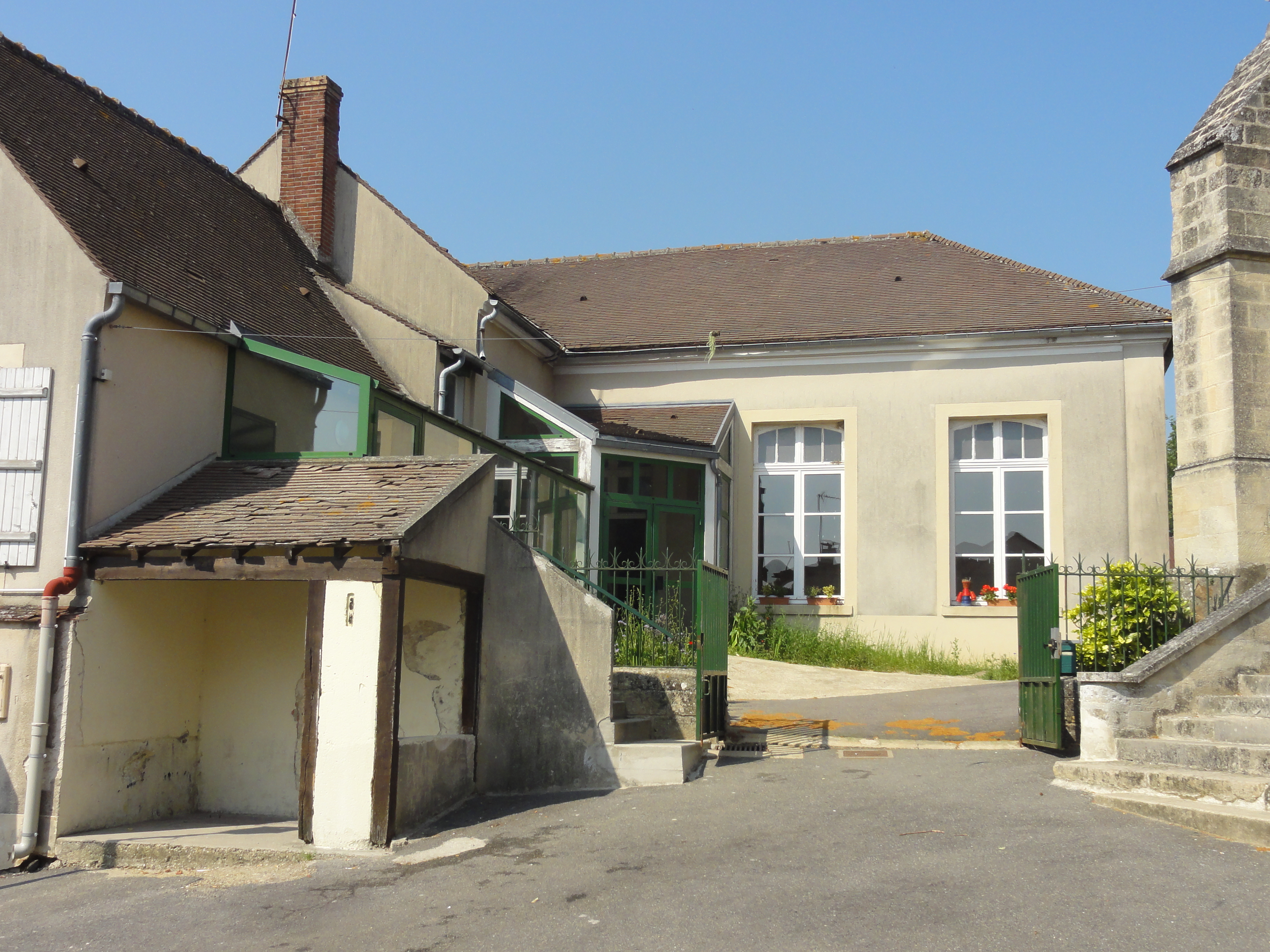 La mairie.